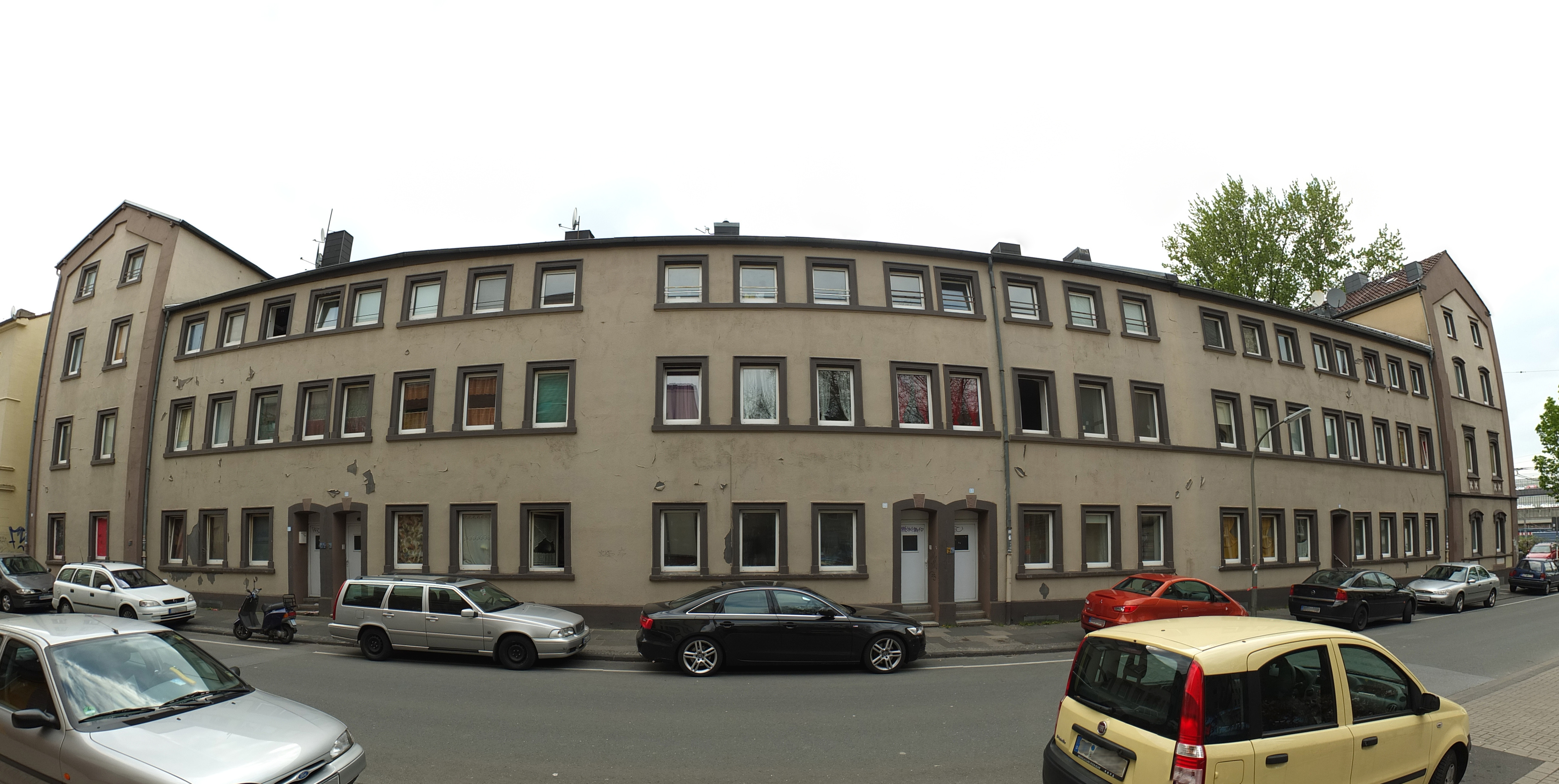 Dortmunder Wohngebäude aus dem 19. Jahrhundert. Teil der "Route der Industriekultur" im Ruhrgebiet, siehe Kaserne der Paulinenhütte